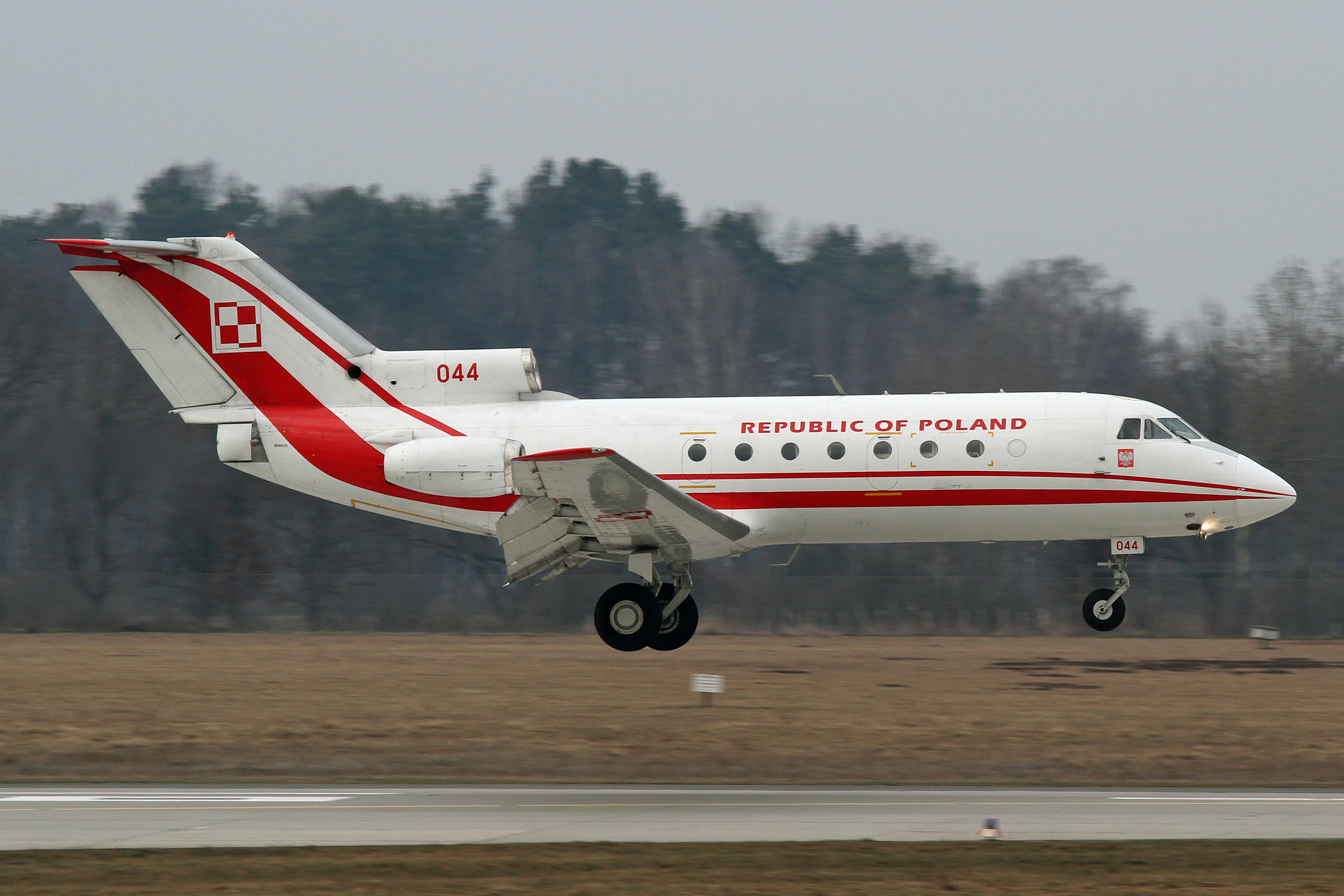 HAJ/EDDV 28-02-11